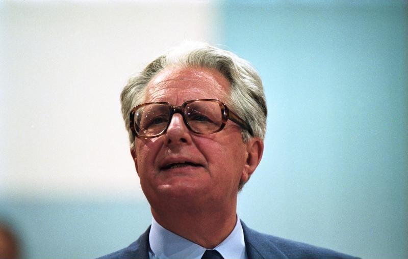 30.8.-2.9.1988 SPD-Parteitag in Münster, Halle Münsterland